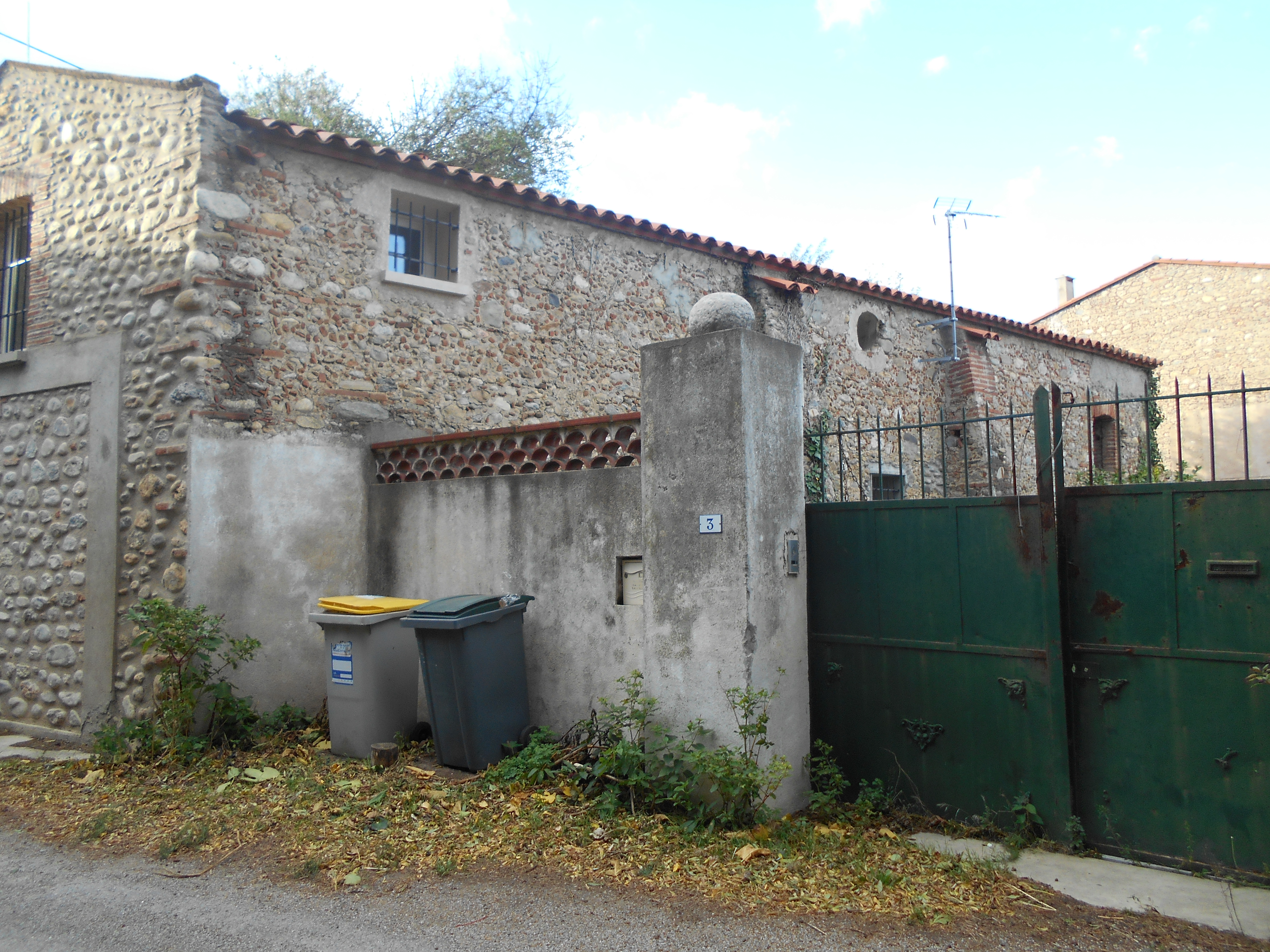 Sant Martí de la Riva